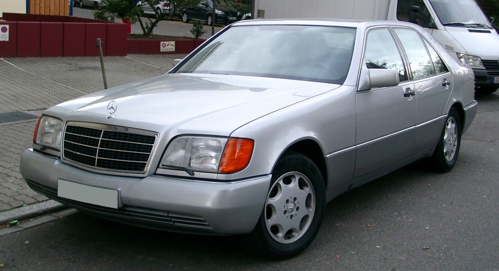 Mercedes-Benz Baureihe 140